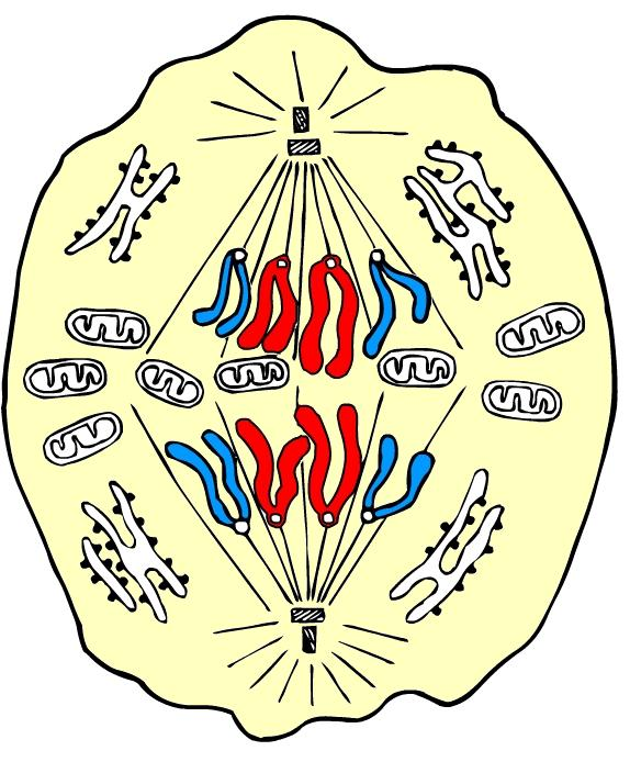 Anaphase de la mitose cellulaire